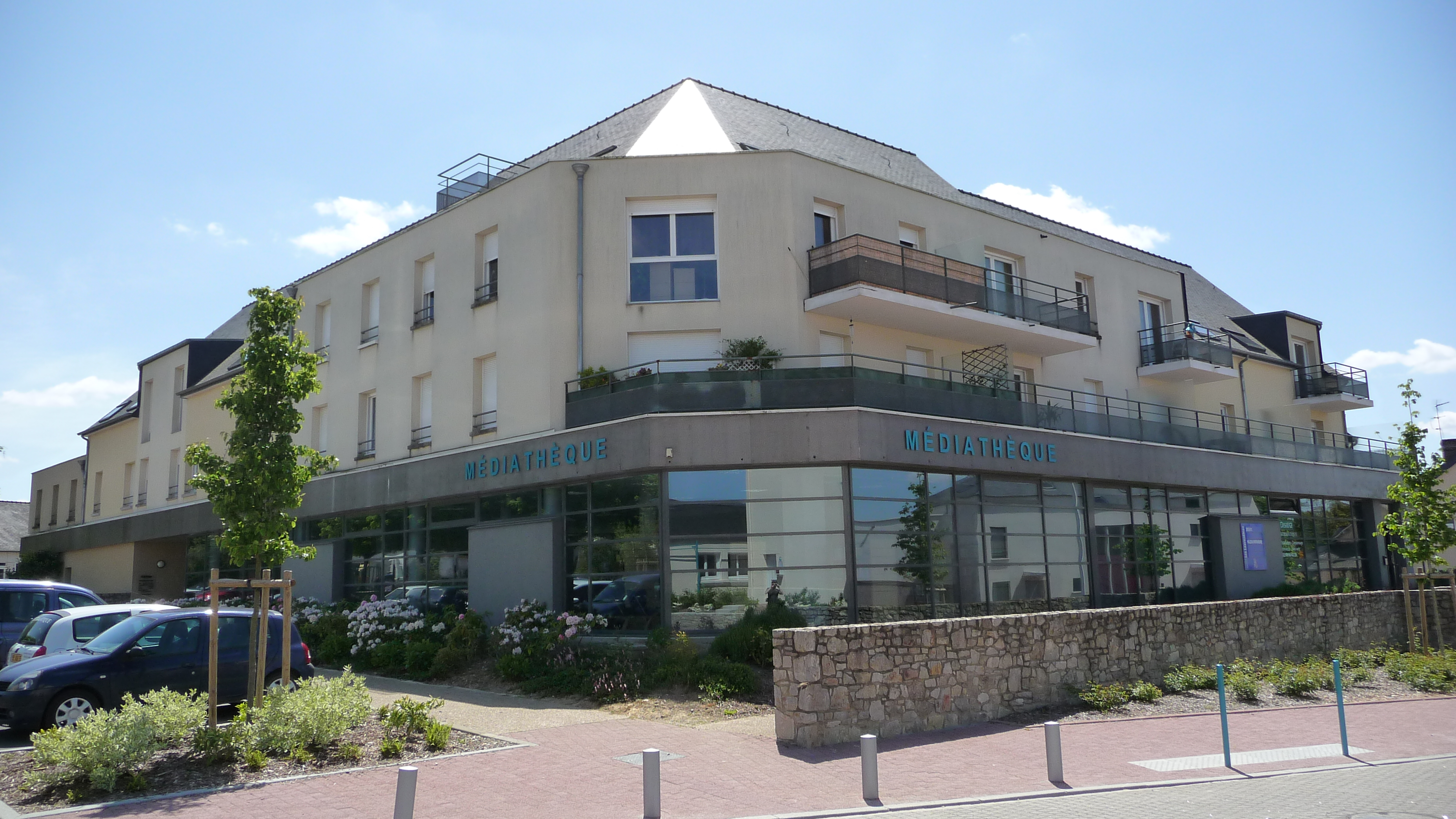 Médiathèque de La Chapelle-des-Fougeretz